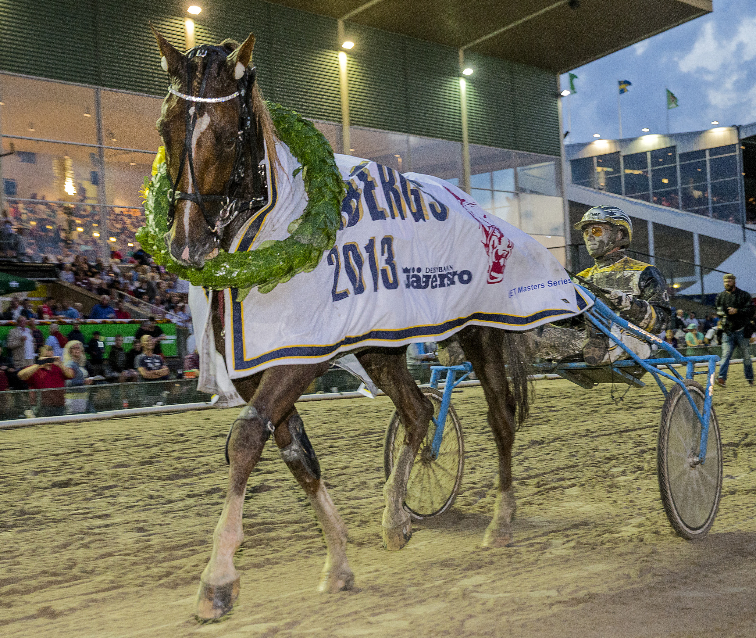 Travaren Commander Crowe och kusken Örjan Kihlström efter vinsten i Hugo Åbergs Memorial på Jägersro i Malmö.